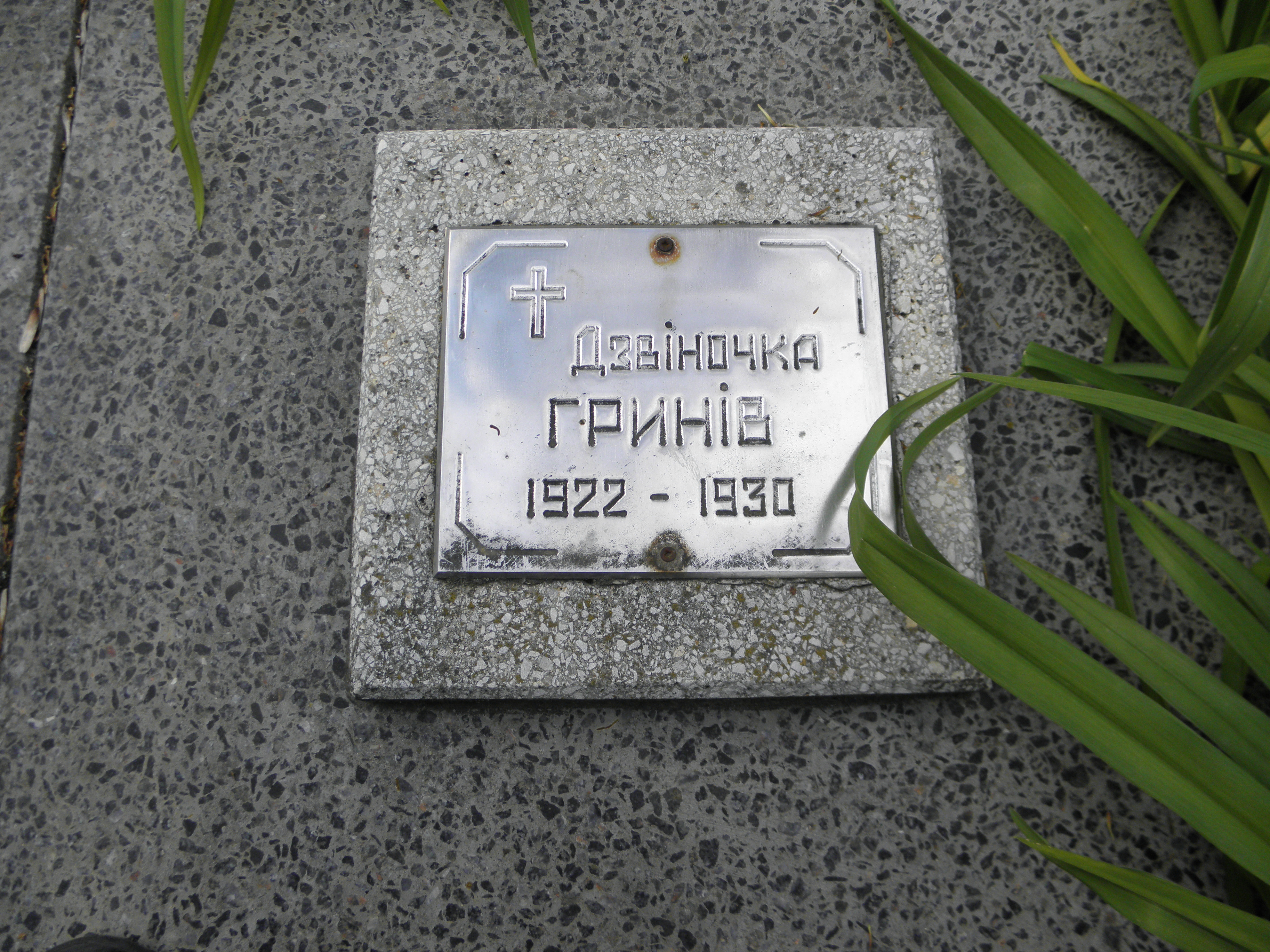 Дзвіночка Гринів, Бучач